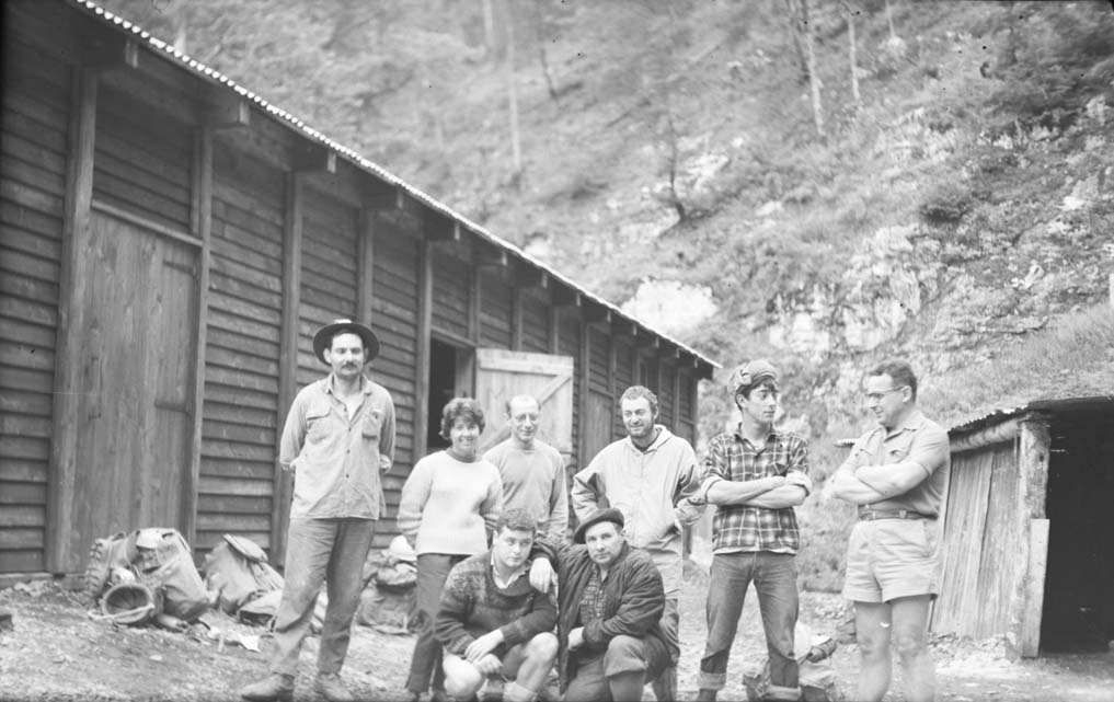 Goiko lerroan, ezkerretik eskuinera: Felix Ruiz de Arkaute, Mari Paz Ibeas, Maurice Le Bozec, Michel Luquet, Jacques Sautereau, Corentin Queffelec. Makurtuta: Anton Arratibel, Juan San Martin.